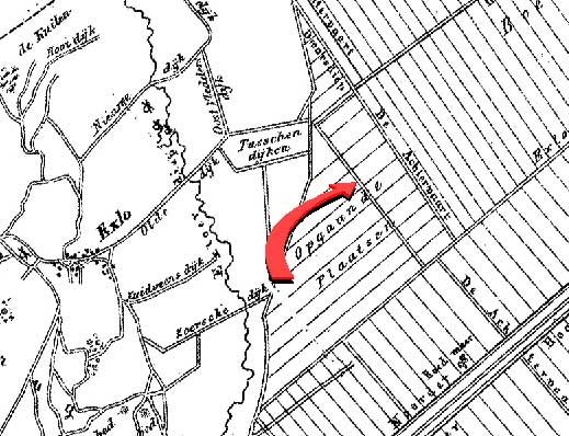 Fragment omgeving Exloërmonden (de locatie van Exloërkijl door mij met rode pijl gemarkeerd)